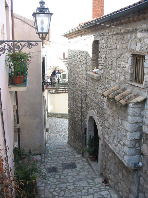 Ettore De Filippo, Parte alta del Vico Grande